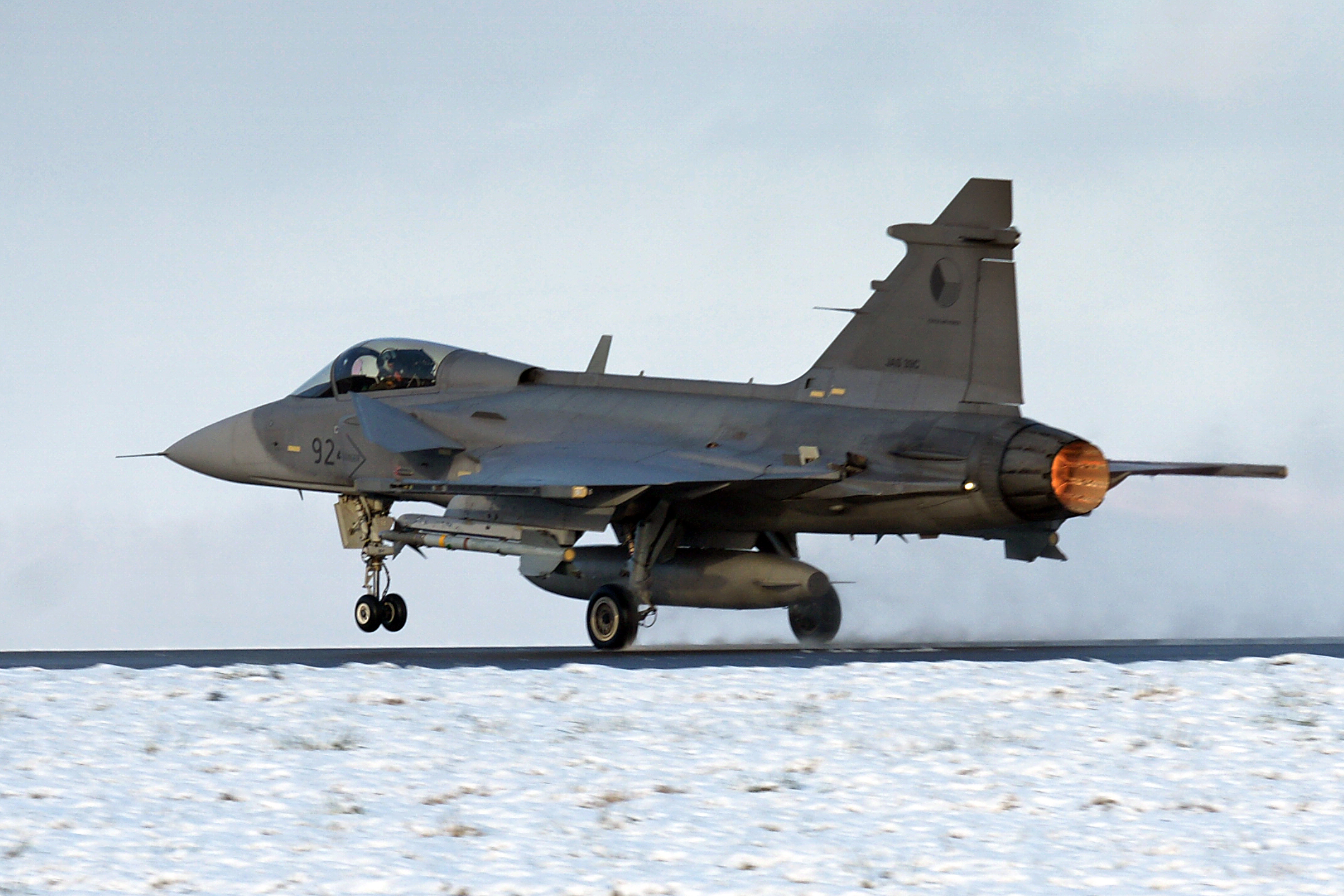 Saab JAS-39 Gripen (Czech Air Force)